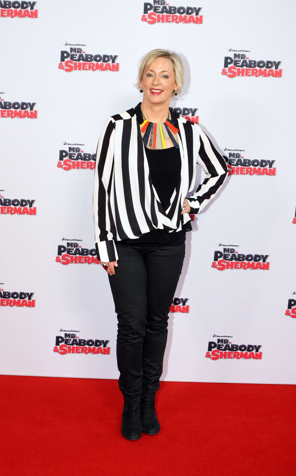 Amanda Rose Keller